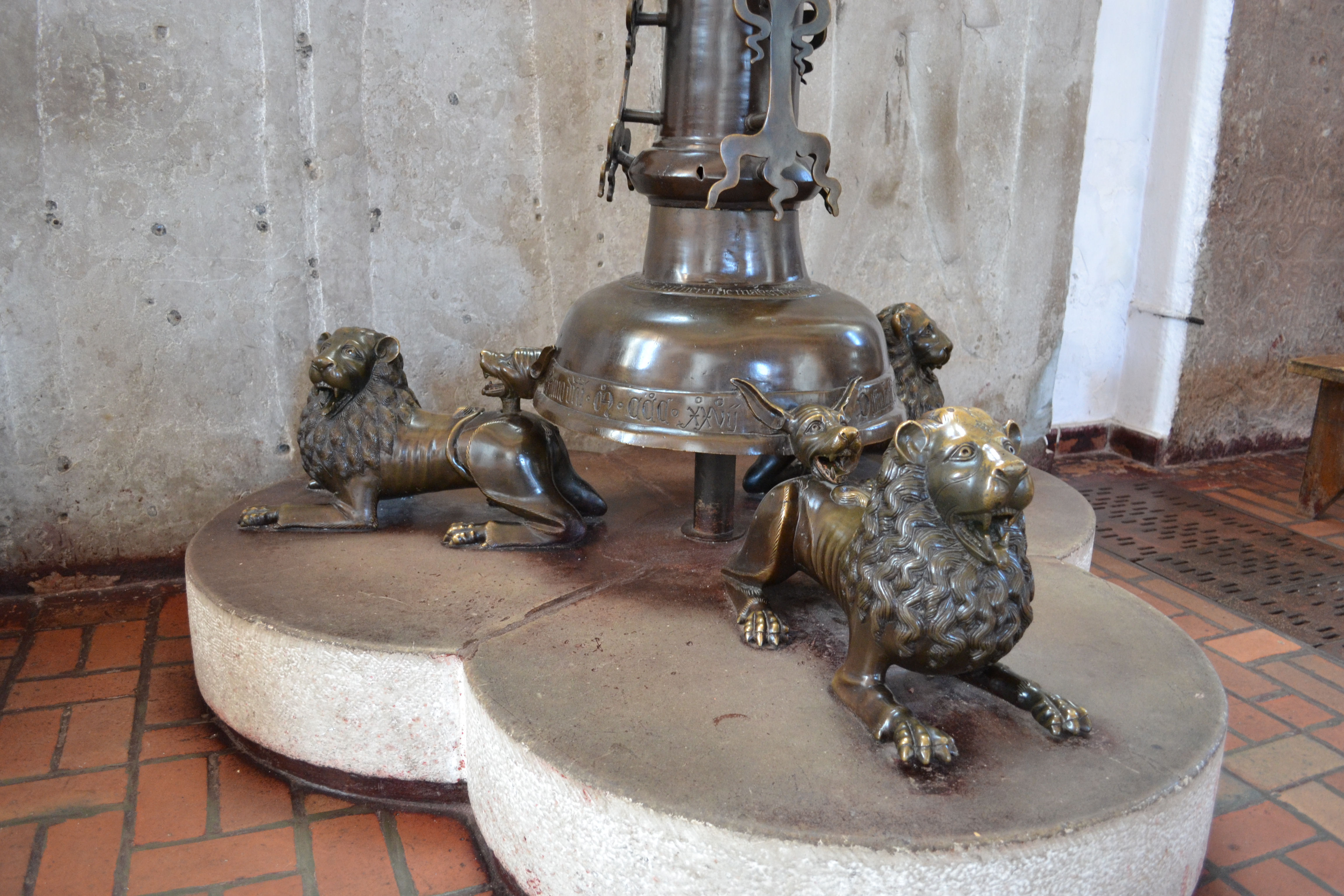 Gotycki świecznik siedmioramienny w katedrze w Kołobrzegu